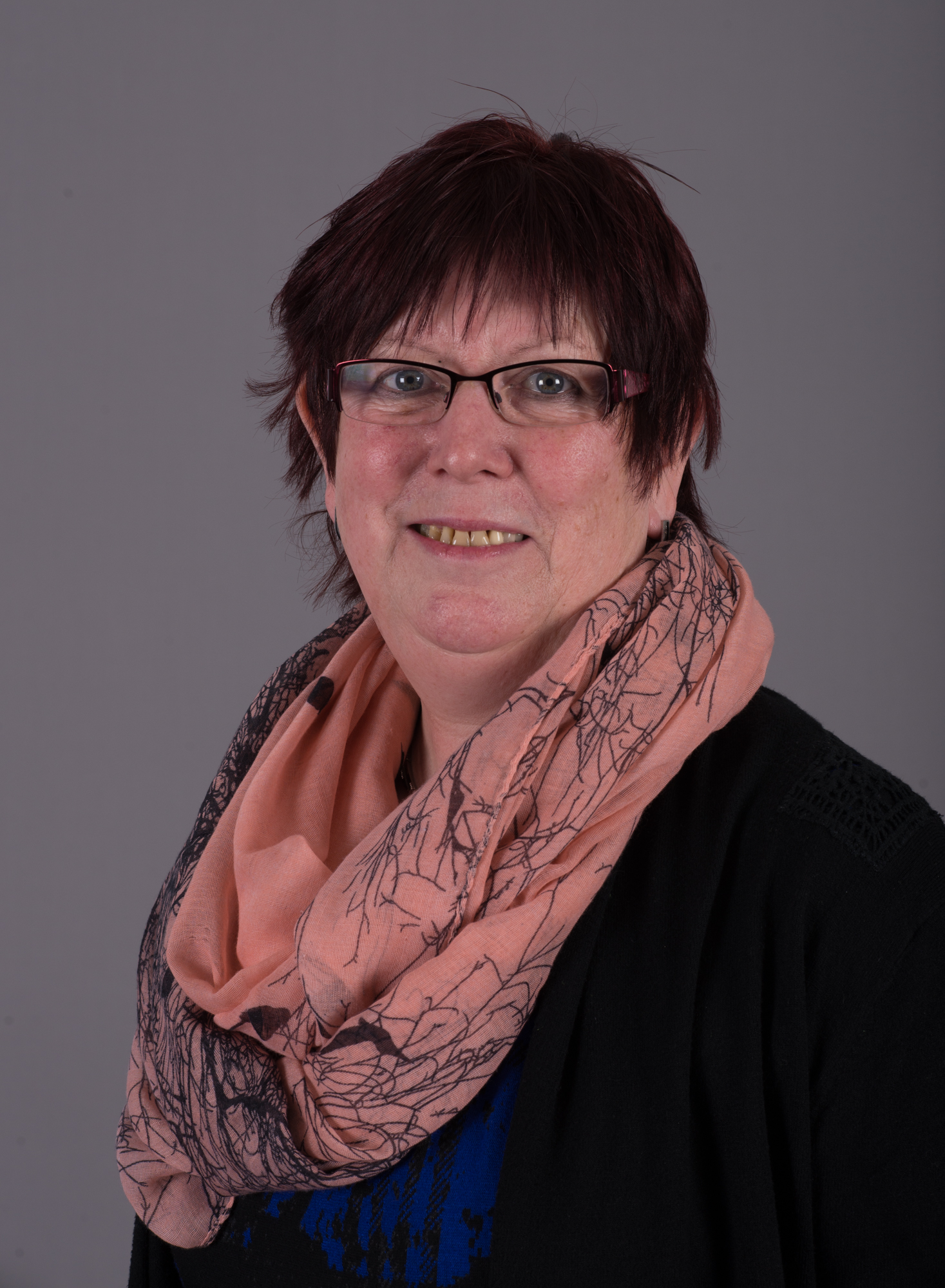 Landtagsprojekt im Thüringer Landtag